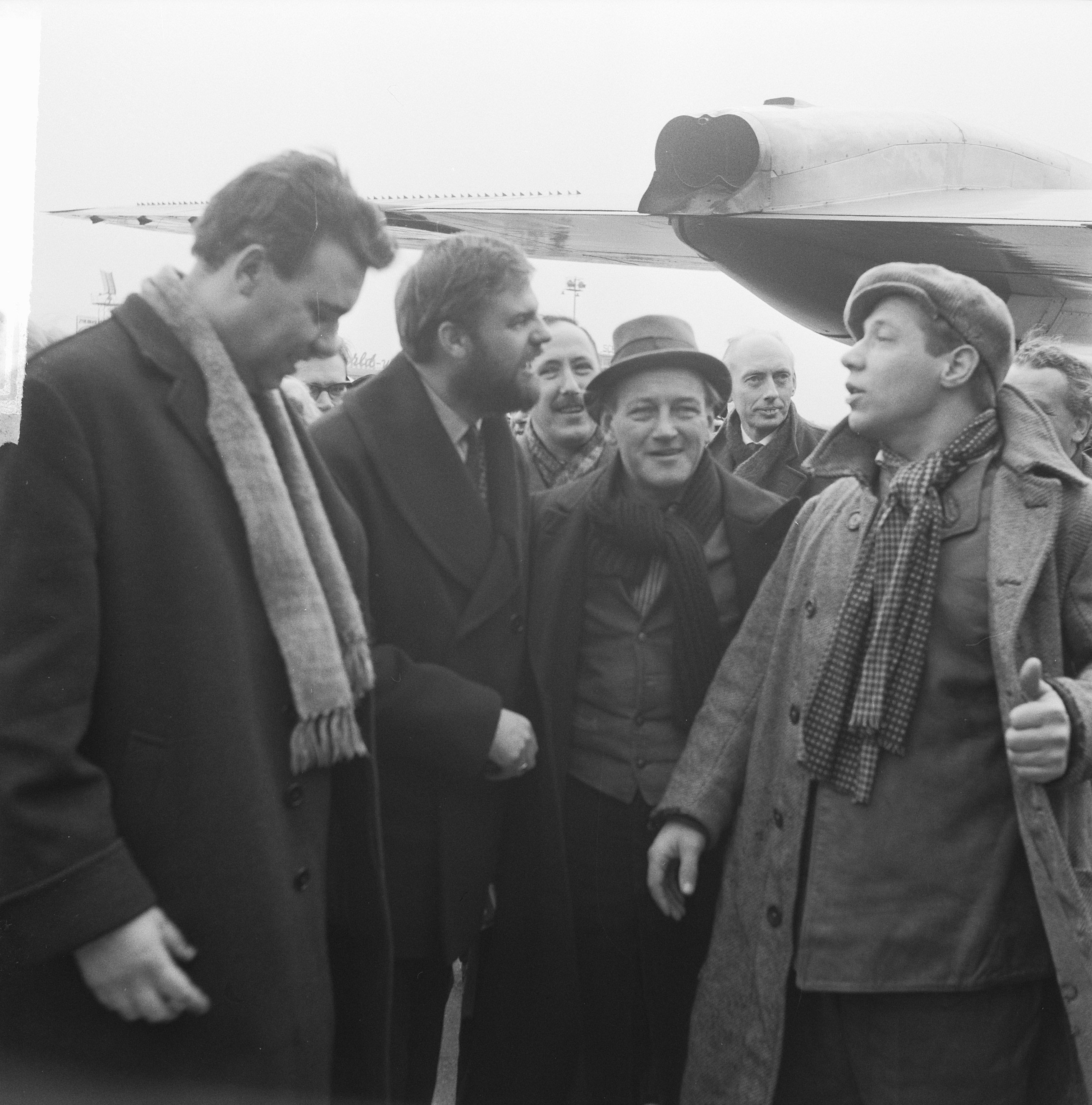 Collectie / Archief : Fotocollectie Anefo Reportage / Serie : [ onbekend ] Beschrijving : Aankomst op Schiphol van de geestelijk vaders van het TV-spel ' Stiefbeen en Zn.', v.l.n.r. Alan Simpson, Ray Galton, Rien van Nunen en Piet Römer Datum : 4 maart 1964 Locatie : Noord-Holland, Schiphol Trefwoorden : televisieseries Persoonsnaam : Galton, Ray, Nunen, Rien van, Römer, Piet, Simpson, Alan Instellingsnaam : Stiefbeen en Zn. Fotograaf : Gelderen, Hugo van / Anefo, [onbekend] Auteursrechthebbende : Nationaal Archief Materiaalsoort : Negatief (zwart/wit) Nummer archiefinventaris : bekijk toegang 2.24.01.03 Bestanddeelnummer : 916-1372